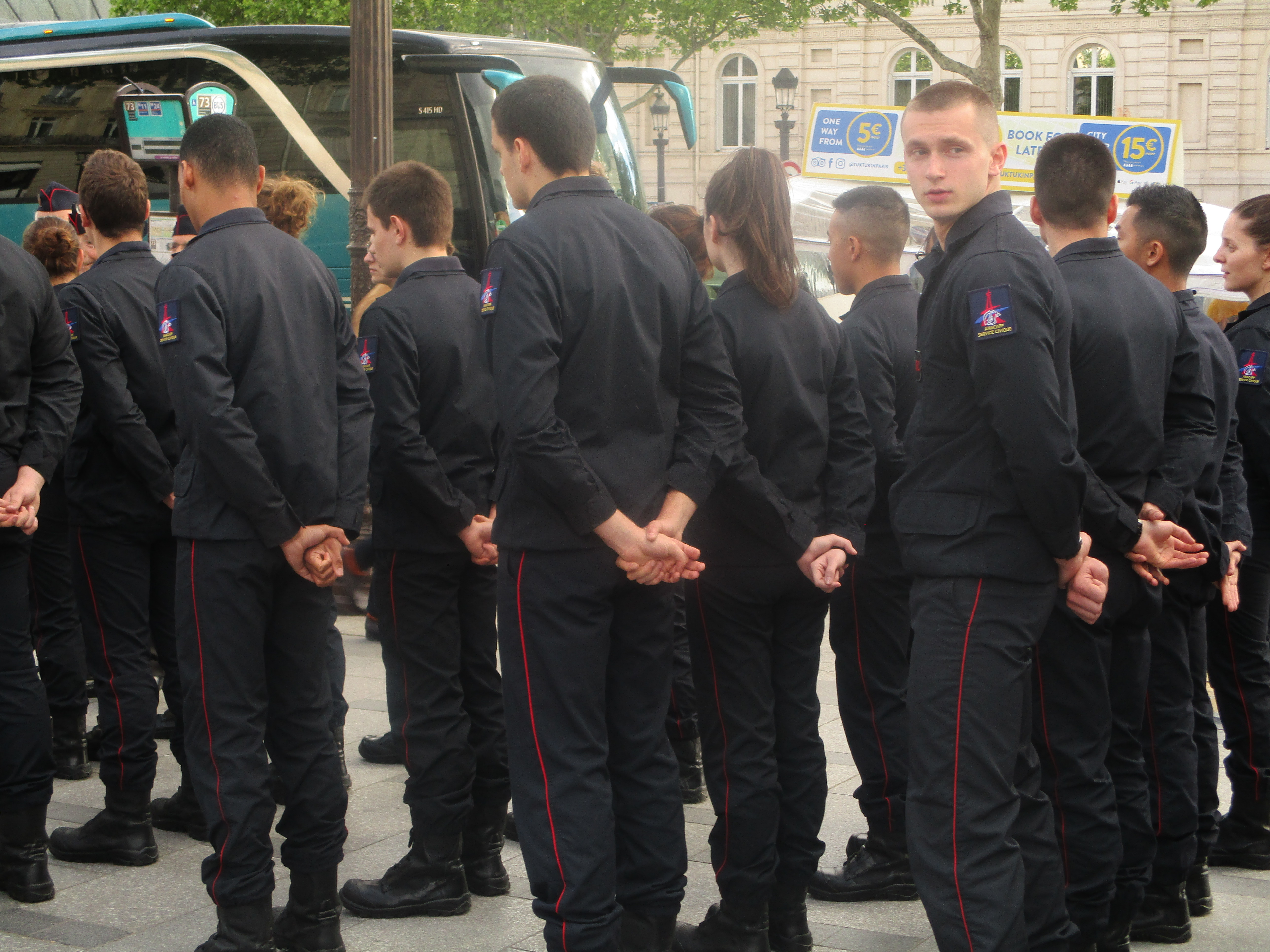 Volontaires du service civique de l'ANACAPP (composante de la Fédération Nationale des Associations de Sapeurs-Pompiers de Paris) formant un cortège avant le ravivage de la flamme du soldat inconnu à l'arc de Triomphe de l'Étoile.